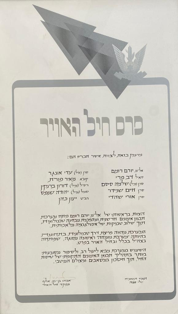 Israeli AirForce award